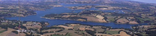 Photo Aérienne d'un autogire ULM du lac de Pareloup en 2003 Auteur Xavier Bonnafous (Xulin)